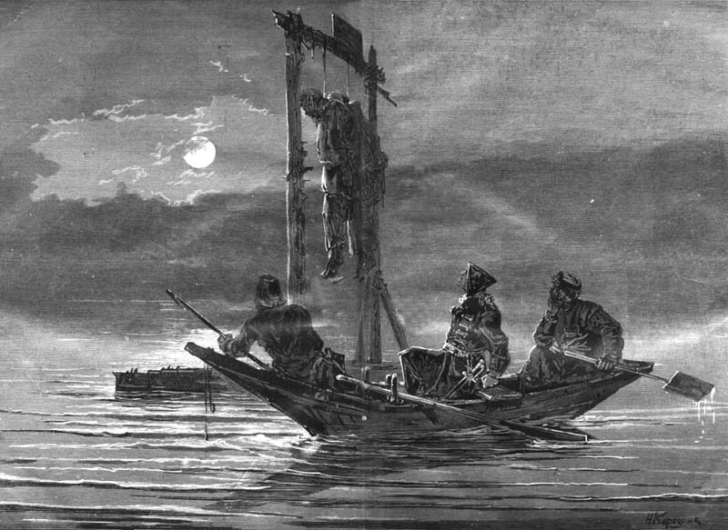 Виселица на Волге (иллюстрация к Капитанской дочке)Гринев_встречает_на_ВолгЪ плотъ съ висЪлицей